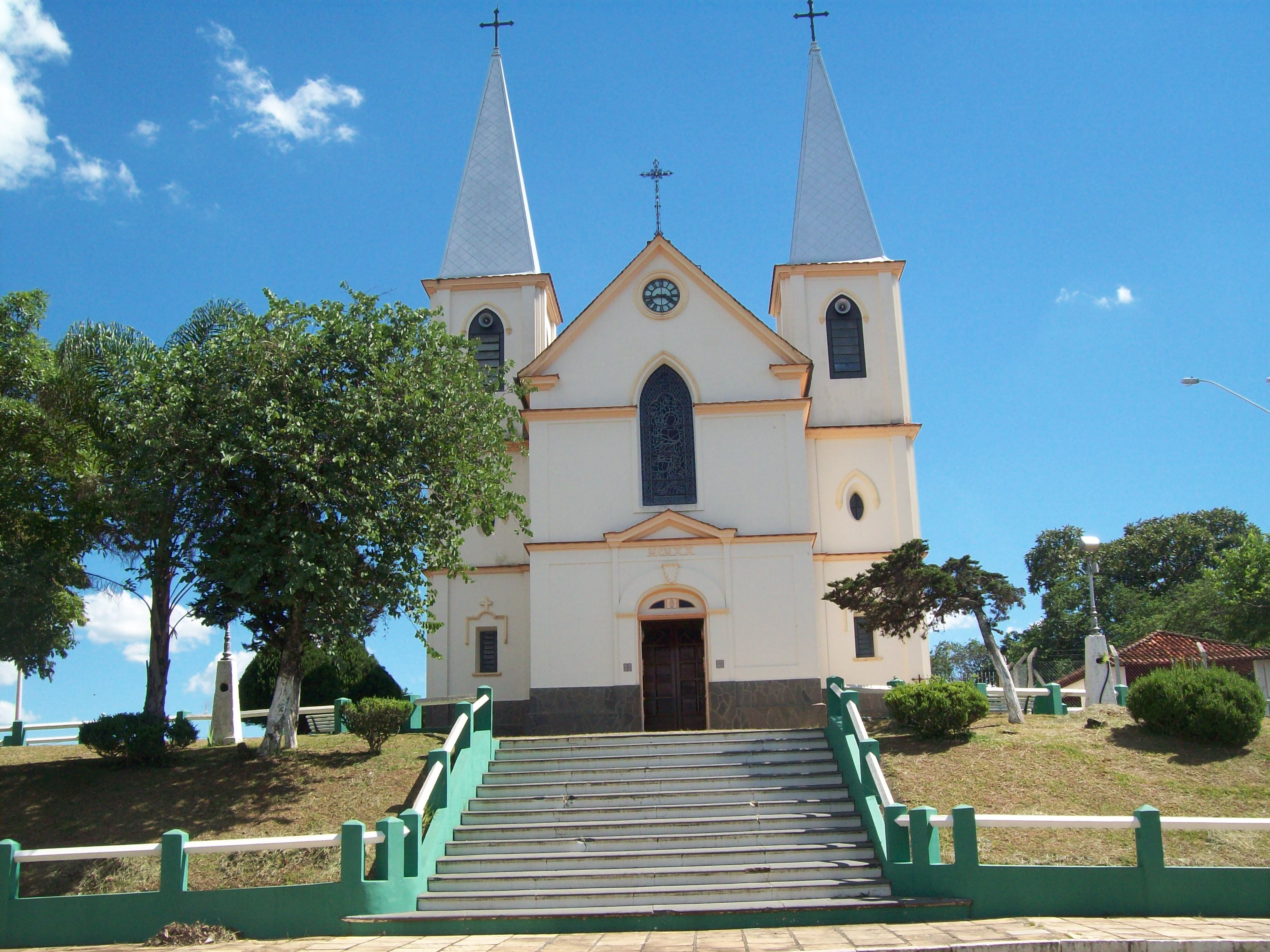 Cambuquira MG Brasil - Matriz